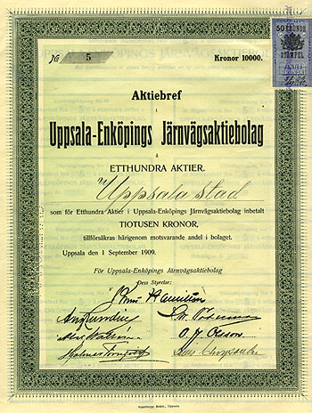 A share certificate for Uppsala-Enköpings Järnväg, Sweden